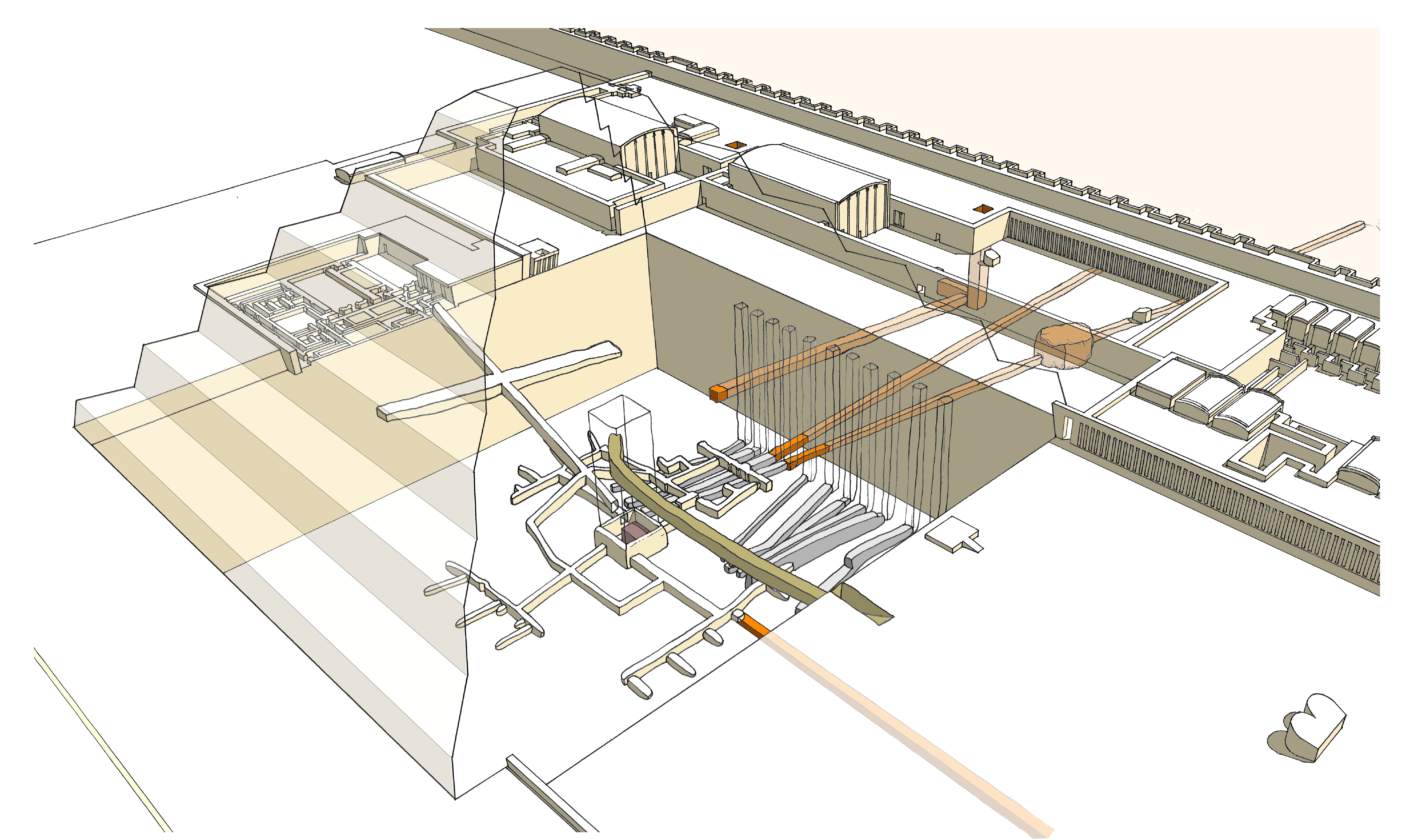 Vue générale des appartements funéraires de la pyramide de Djoser à Saqqarah (en vert, la galerie d'époque saïte et en jaune, la galerie d'époque romaine (information provenant du directeur de la mission lettone à Saqqarah, Bruno Deslandes) For commercial purpose, I'd like to be notified.